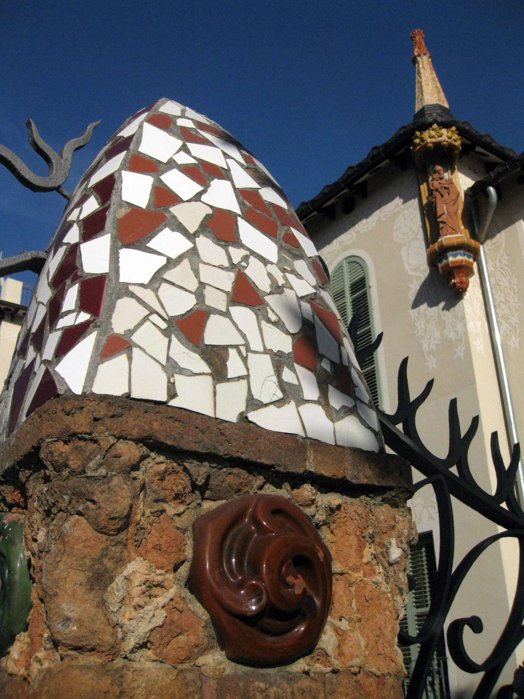 Casa Coll i Bacardí, o Casa Baumann, a l'avinguda de Jacquard núm. 1 (Terrassa), vora el torrent de Vallparadís. Obra modernista de Josep Maria Coll i Bacardí de 1913. Decoració de trencadís de la tanca del jardí.